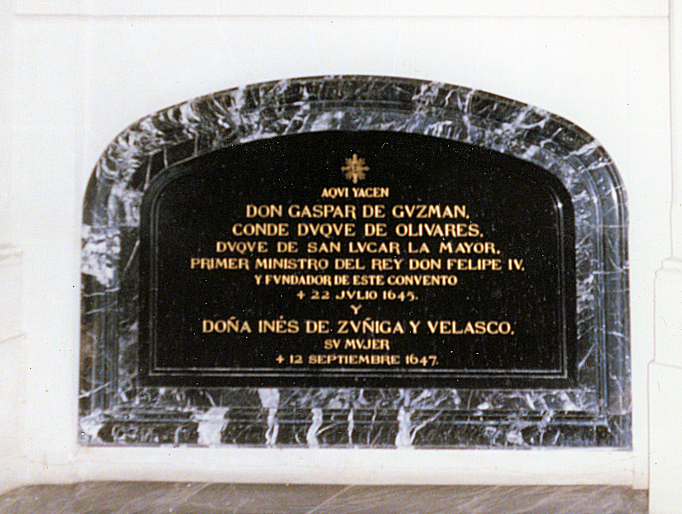 Tumba del Conde Duque de Olivares en Loeches, España Conde Duque de Olivares's tomb in Loeches, Spain